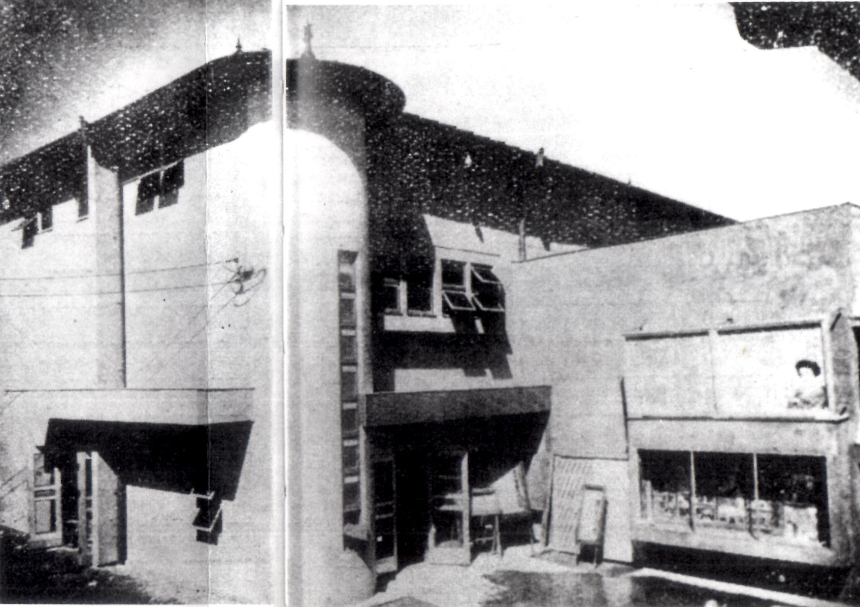 愛知県安城市・弥生館 1950年頃